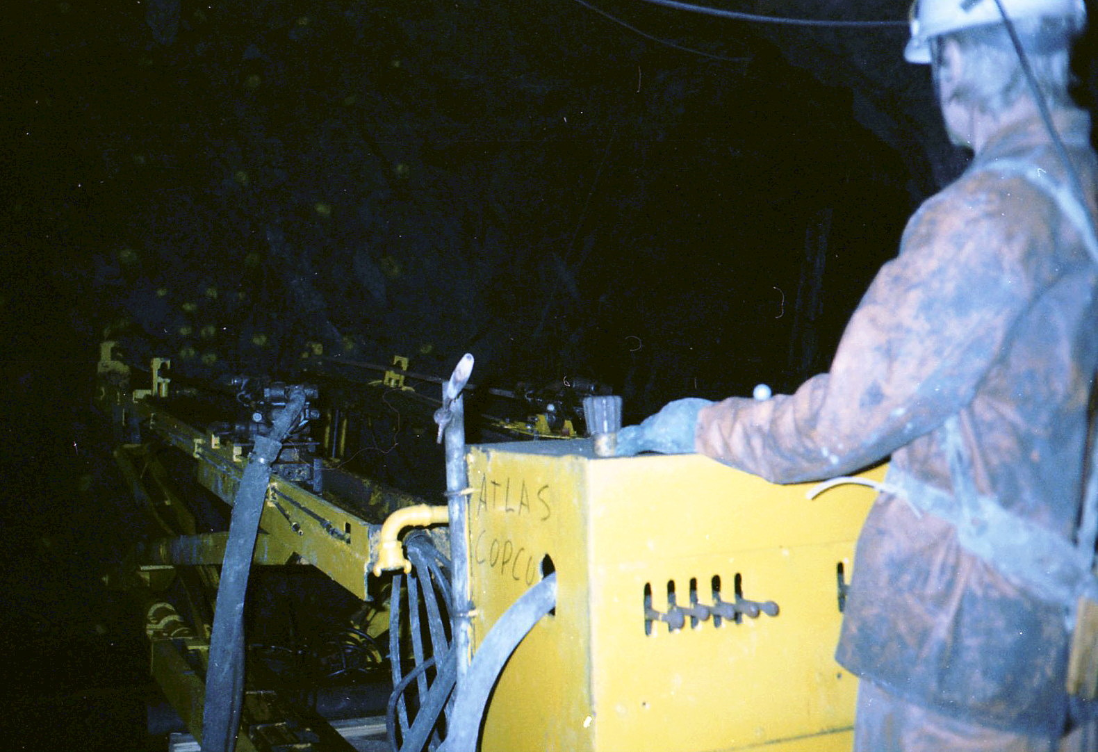 I Stråssa besöksgruva 1984